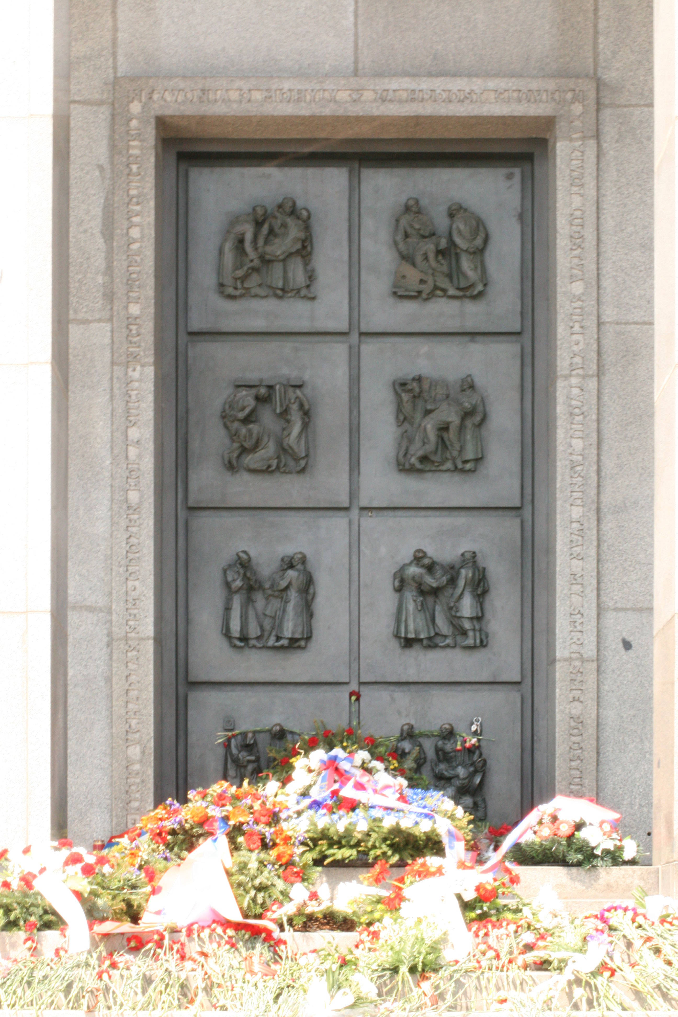 Vstupný portál na bratislavskom Slavíne